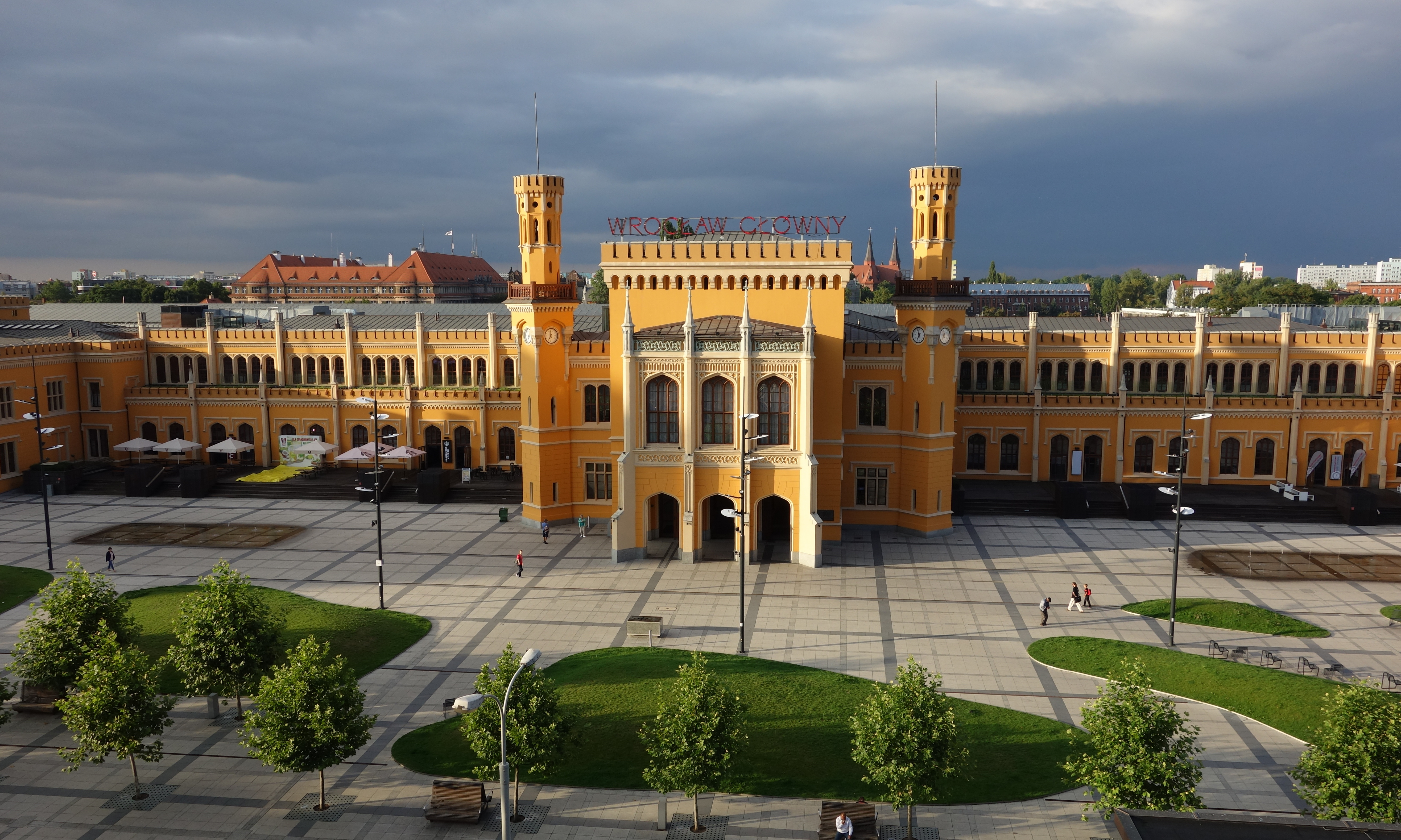 Wrocław Główny , You can see all photographs in category Wikiekspedycja kolejowa 2014.